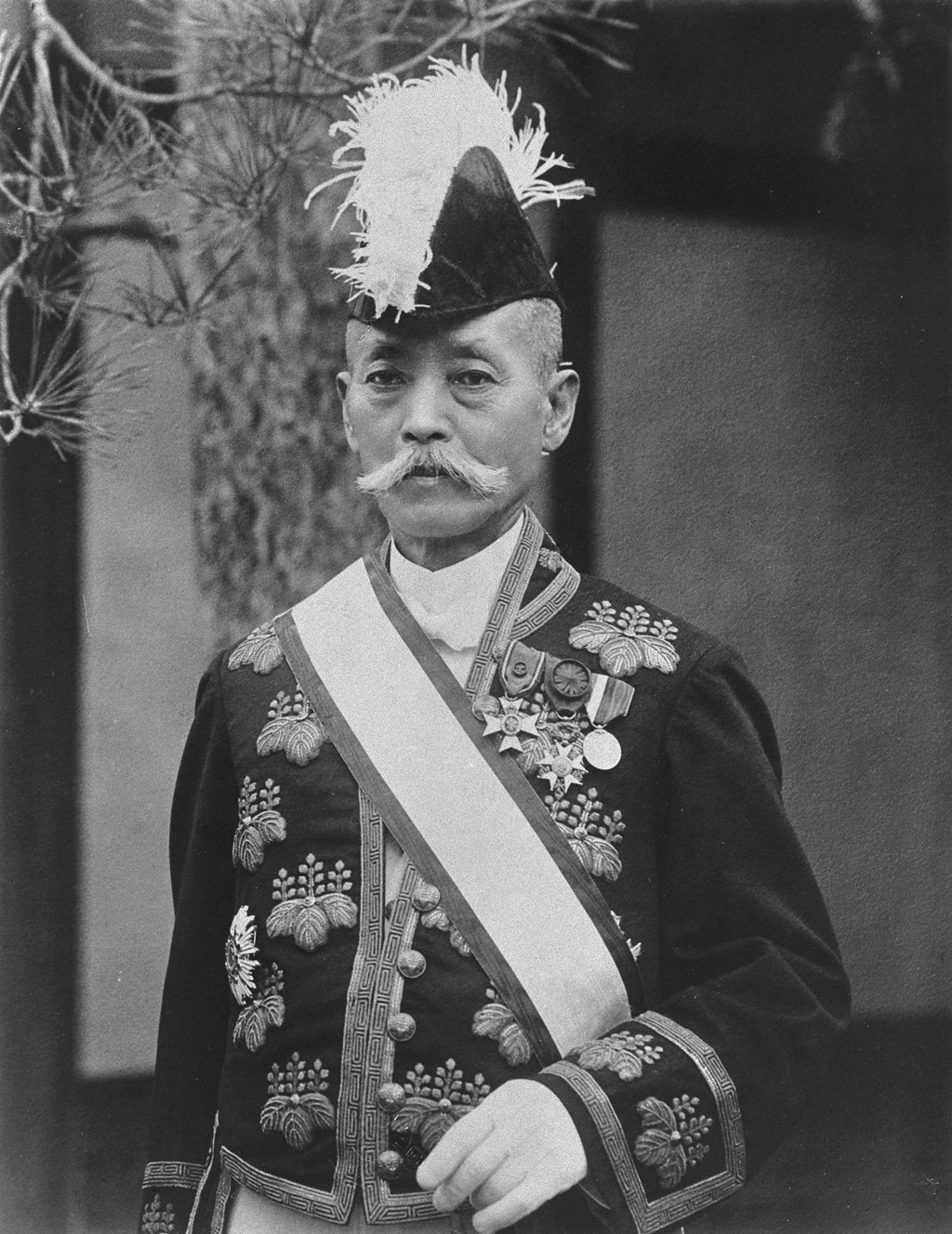 Portrait of Ozaki Yukio (尾崎行雄, 1858 – 1954)